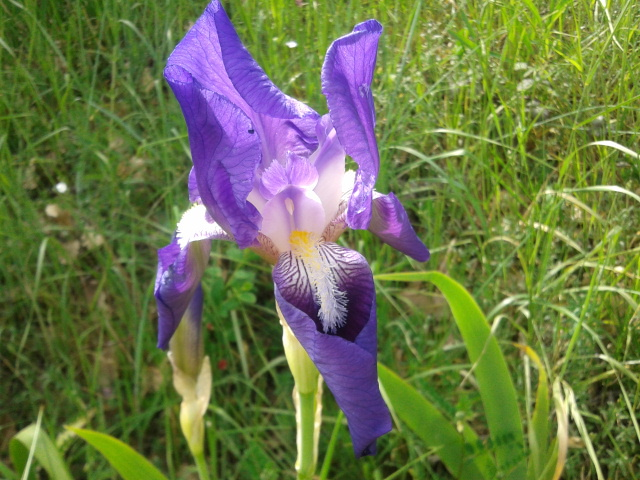 Iris marsicano (Iris marsica)